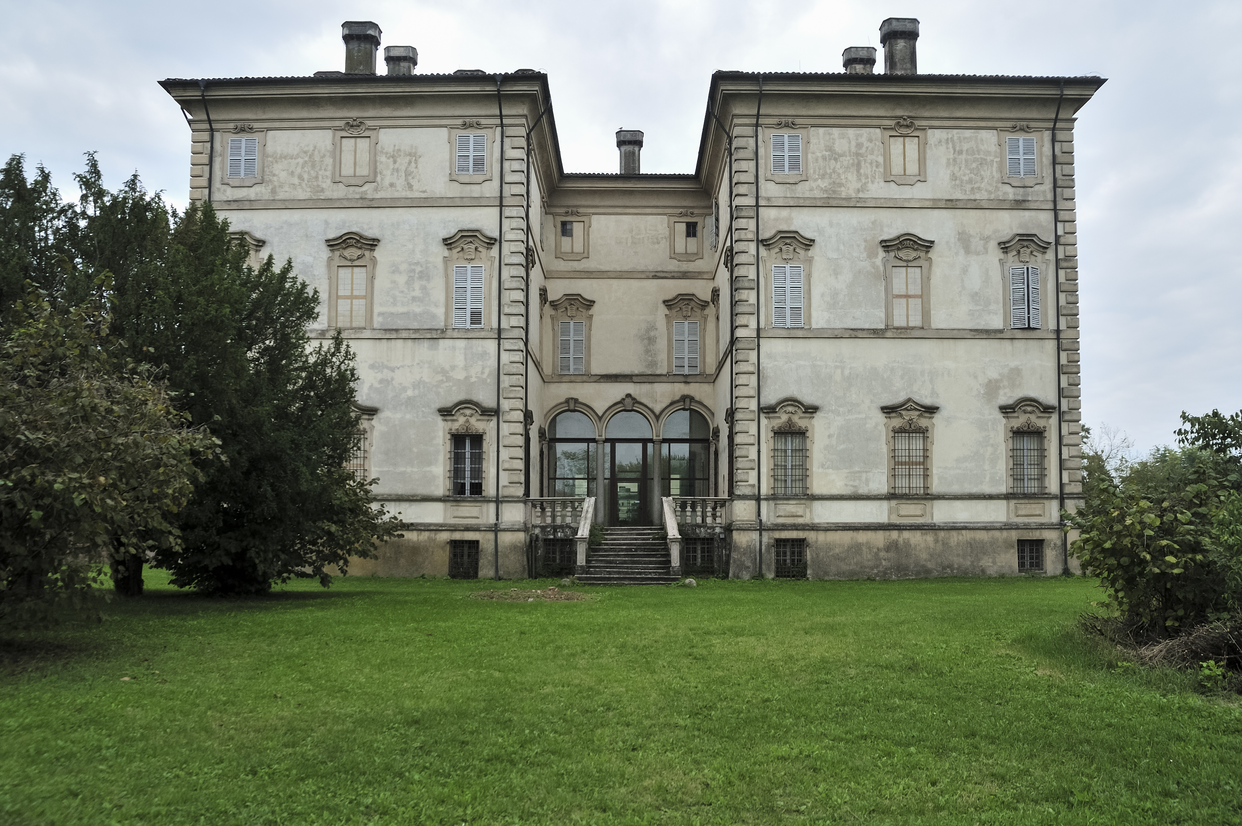 villa Pallavicino This is a photo of a monument which is part of cultural heritage of Italy.